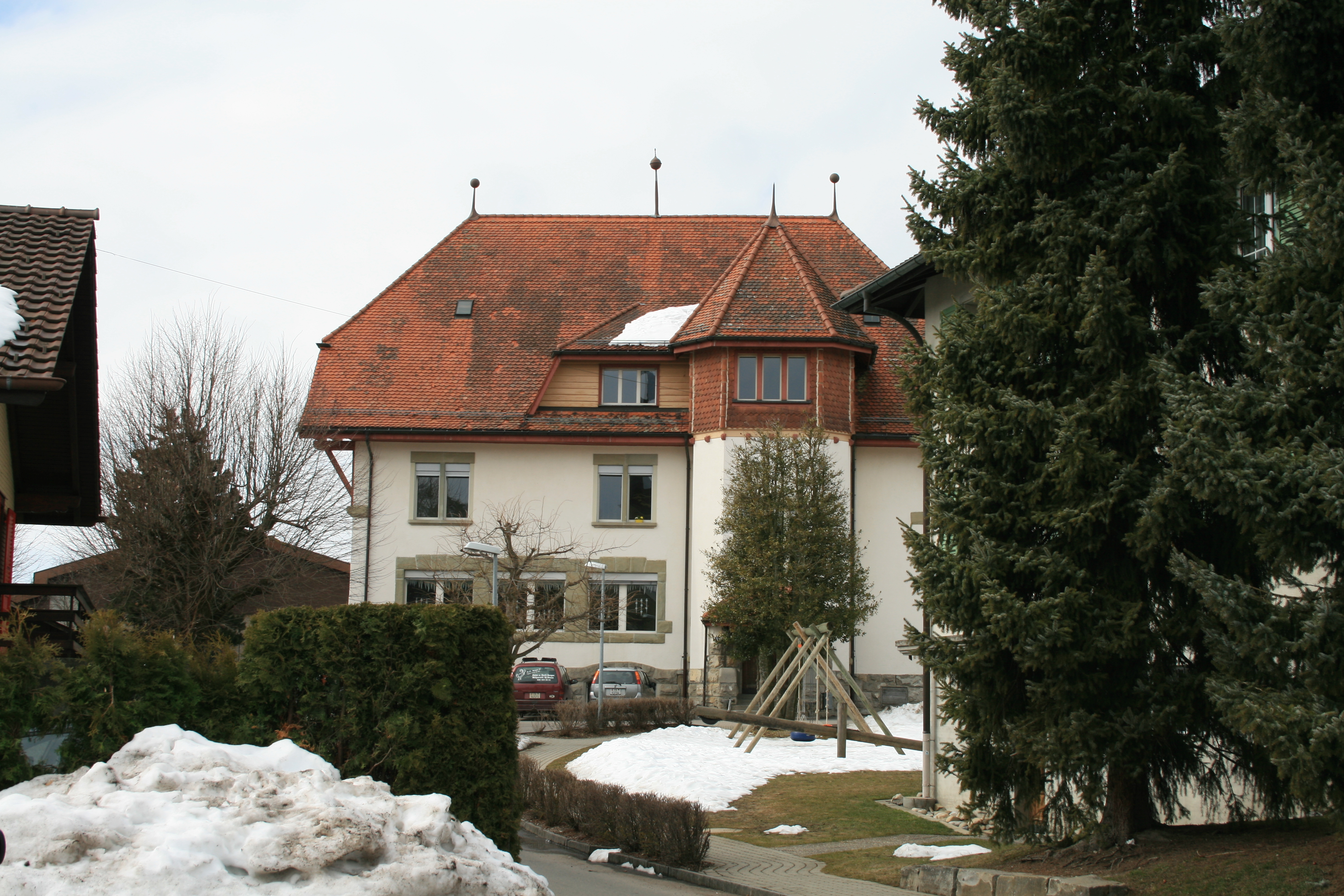 Primarschulhaus Rechthalten, Schweiz